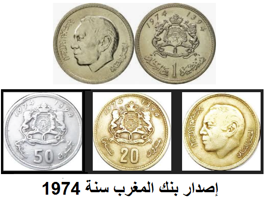 عملة مغربية. إصدار بنك المغرب سنة 1974